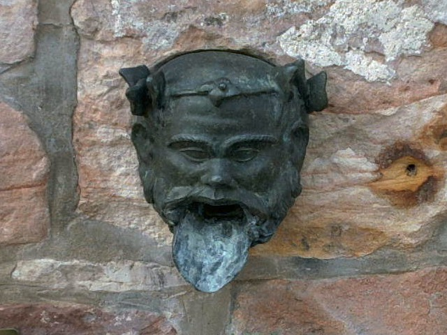 Römische Brunnenmaske (Nachbildung)